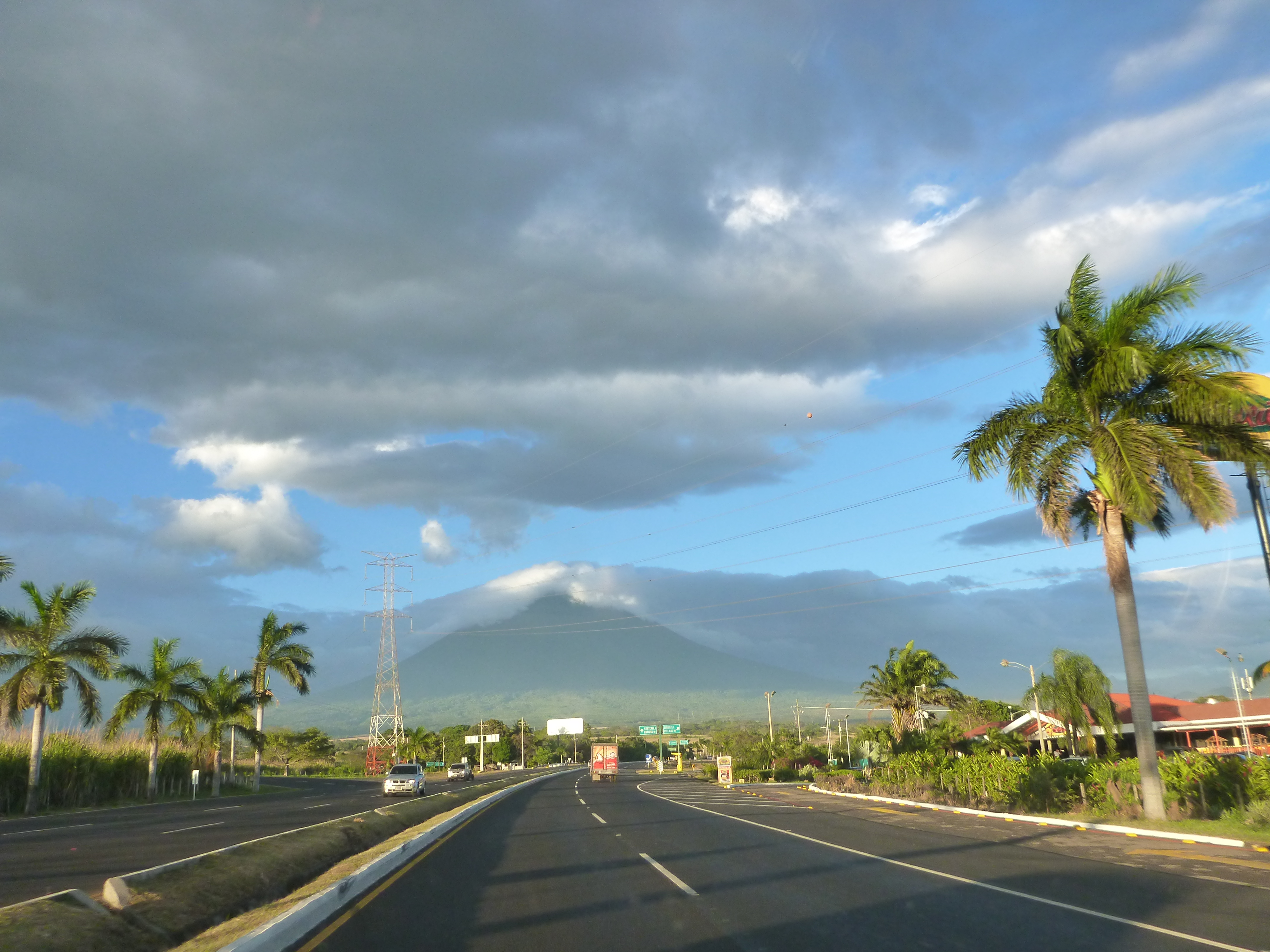 Palin, Guatemala